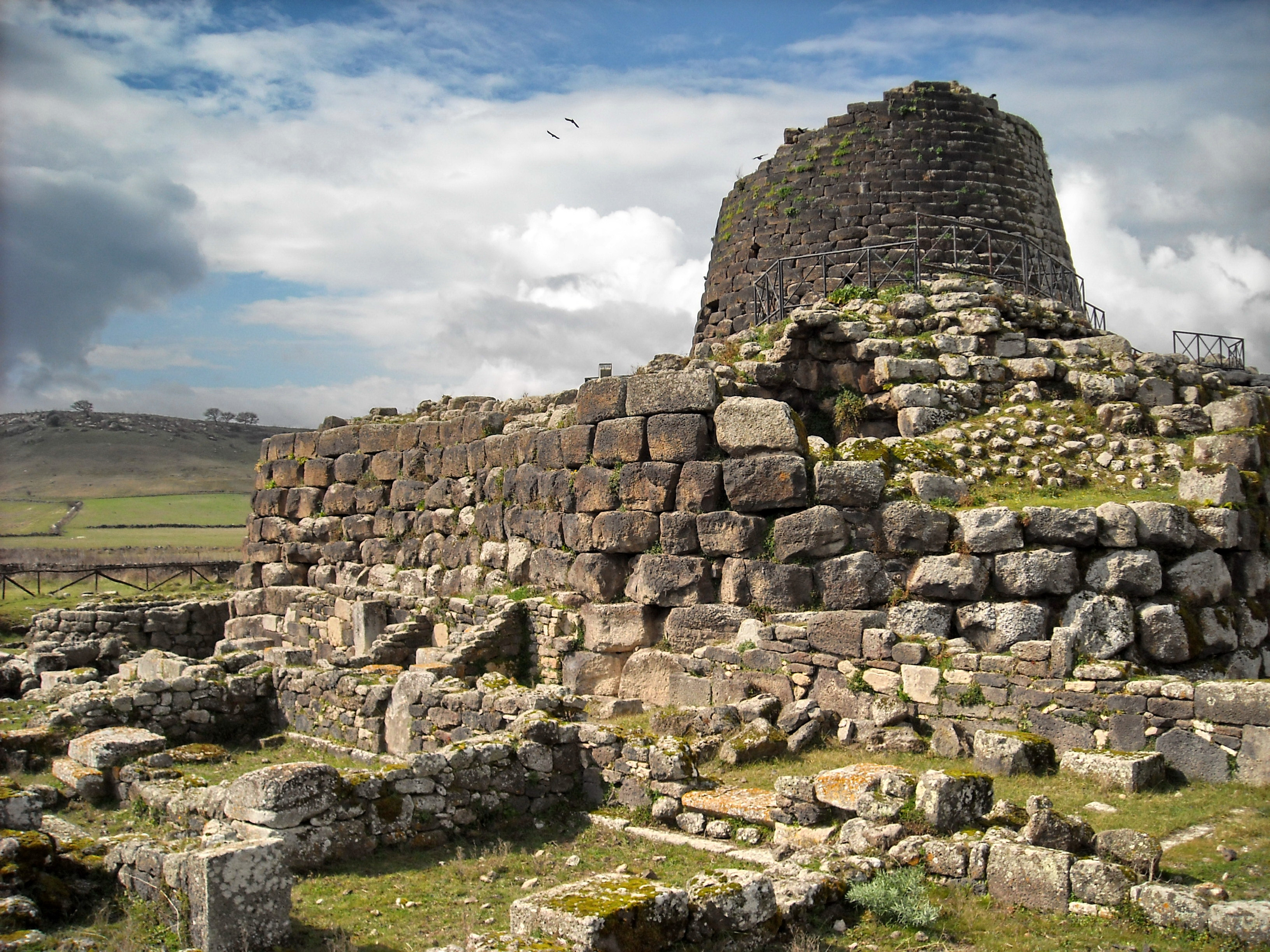 Nuraghe Santu Antine - MIBAC This is a photo of a monument which is part of cultural heritage of Italy.